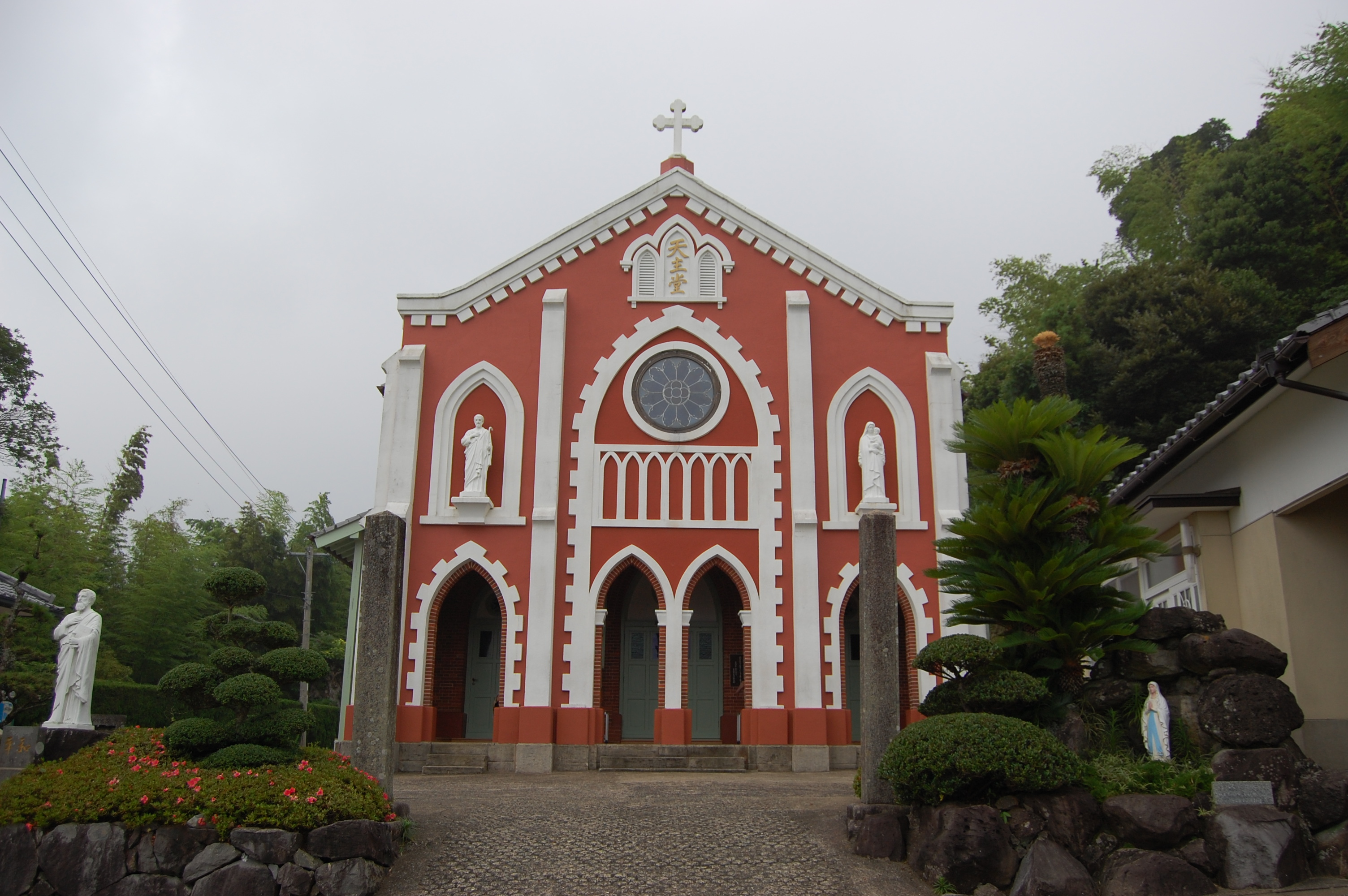 HoukiChurch in Hirado, Nagasaki